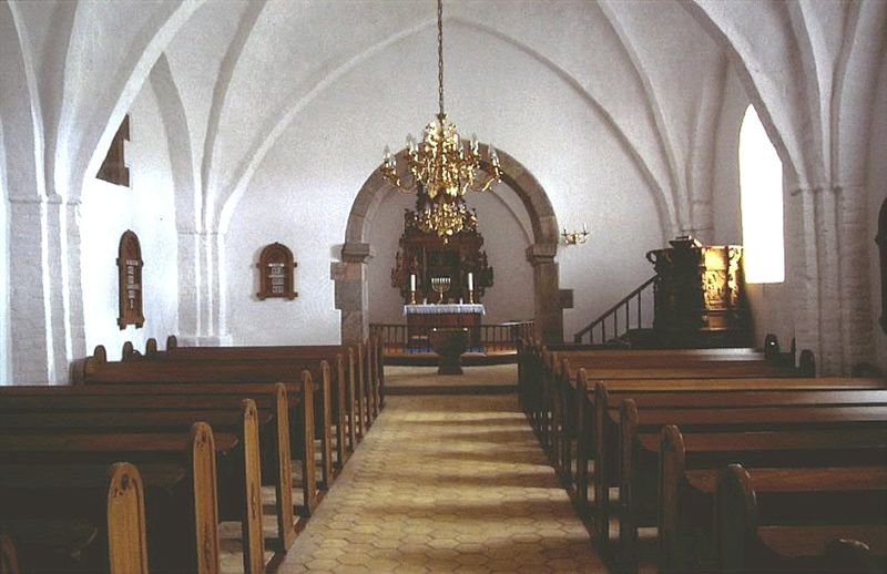 Sporup Kirke Kirkerummet Sporup Kirke ligger i Sporup Sogn, Favrskov Provsti (Århus Stift). Sognet ligger i Favrskov Kommune; indtil Kommunalreformen i 1970 lå det i Gjern Herred (Skanderborg Amt). Apsis, kor og skib er opført i romansk tid af granitkvadre